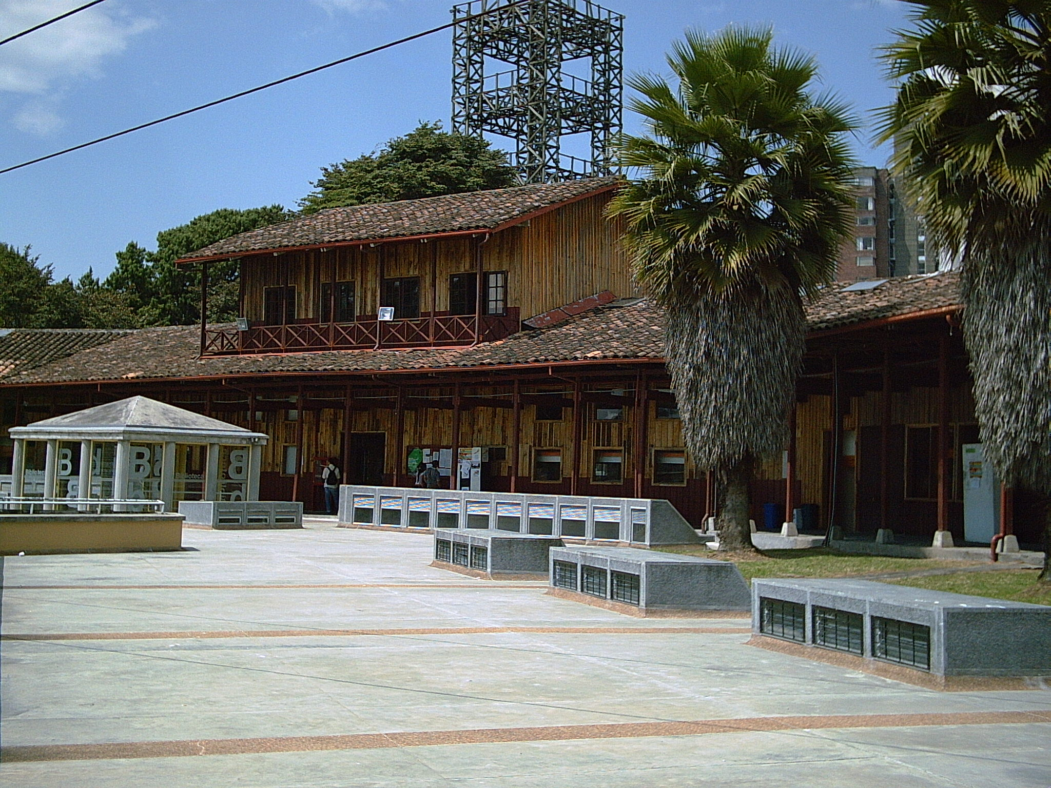 Facultad de arquitectura, Universidad Nacional de Colombia, en Manizales